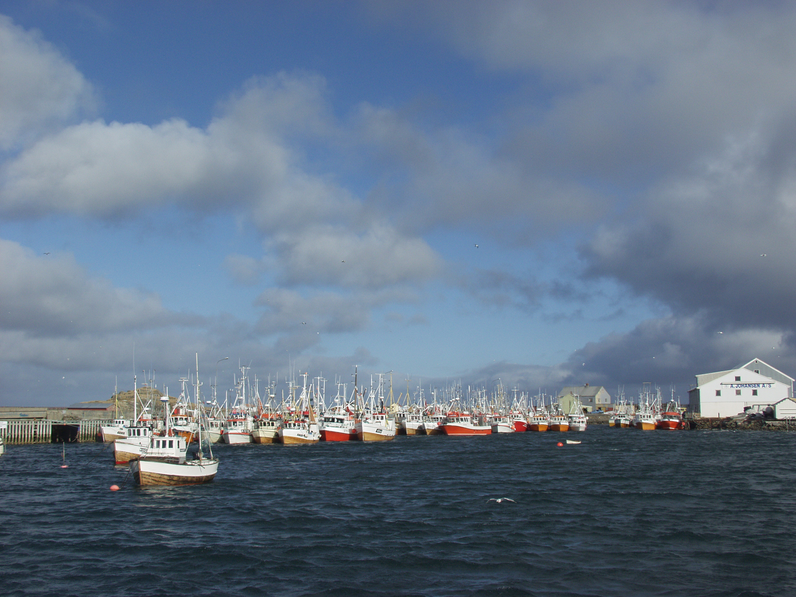 Fiskefartøy fra andre deler av kysten kommer til dette fisket for å være med i februar/mars. Mange av dem drar videre til Finmark for å fiske der etter påske.